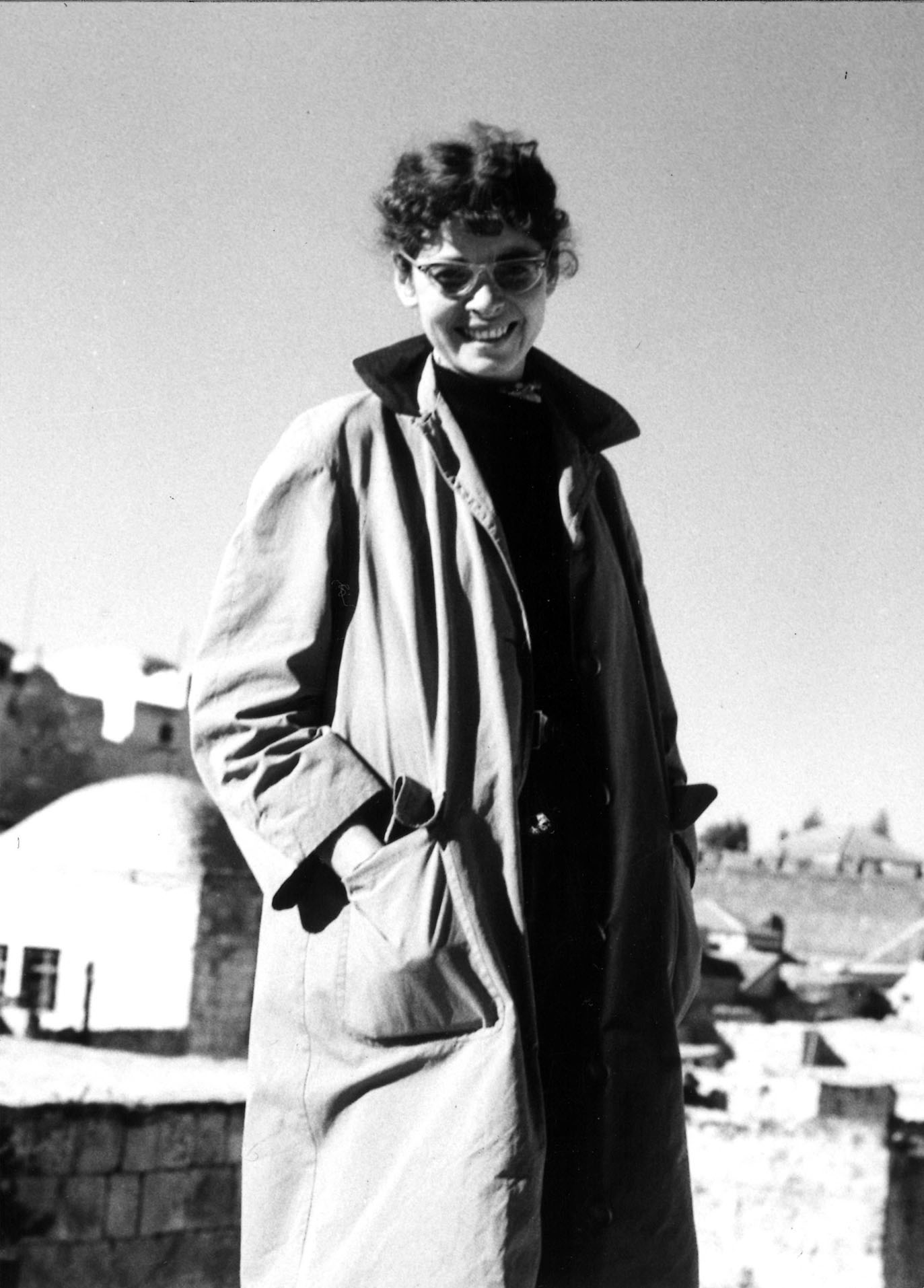 Portrait von Helen Keiser